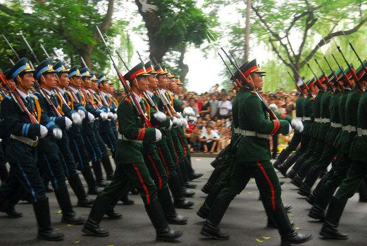 Diễu hành Đại lễ ngìn năm Thăng Long - Hà Nội